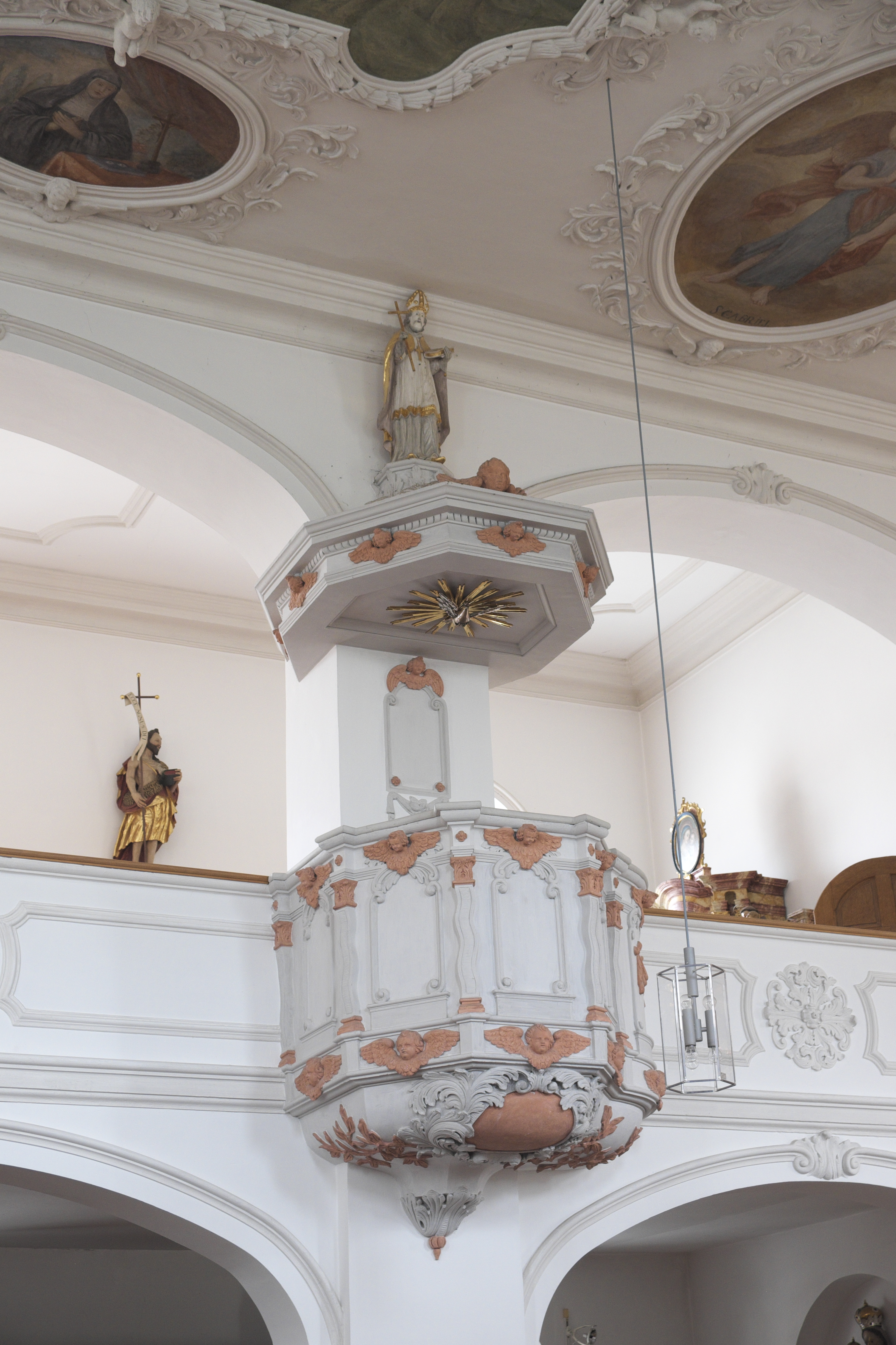 Katholische Pfarrkirche St. Leonhard in Pförring im oberbayerischen Landkreis Eichstätt (Bayern/Deutschland), Kanzel